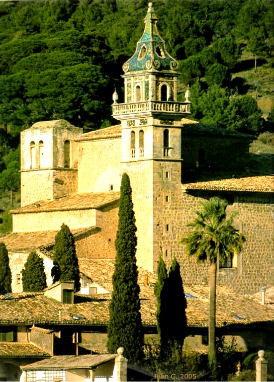 La cartuja Kartäuserkloster